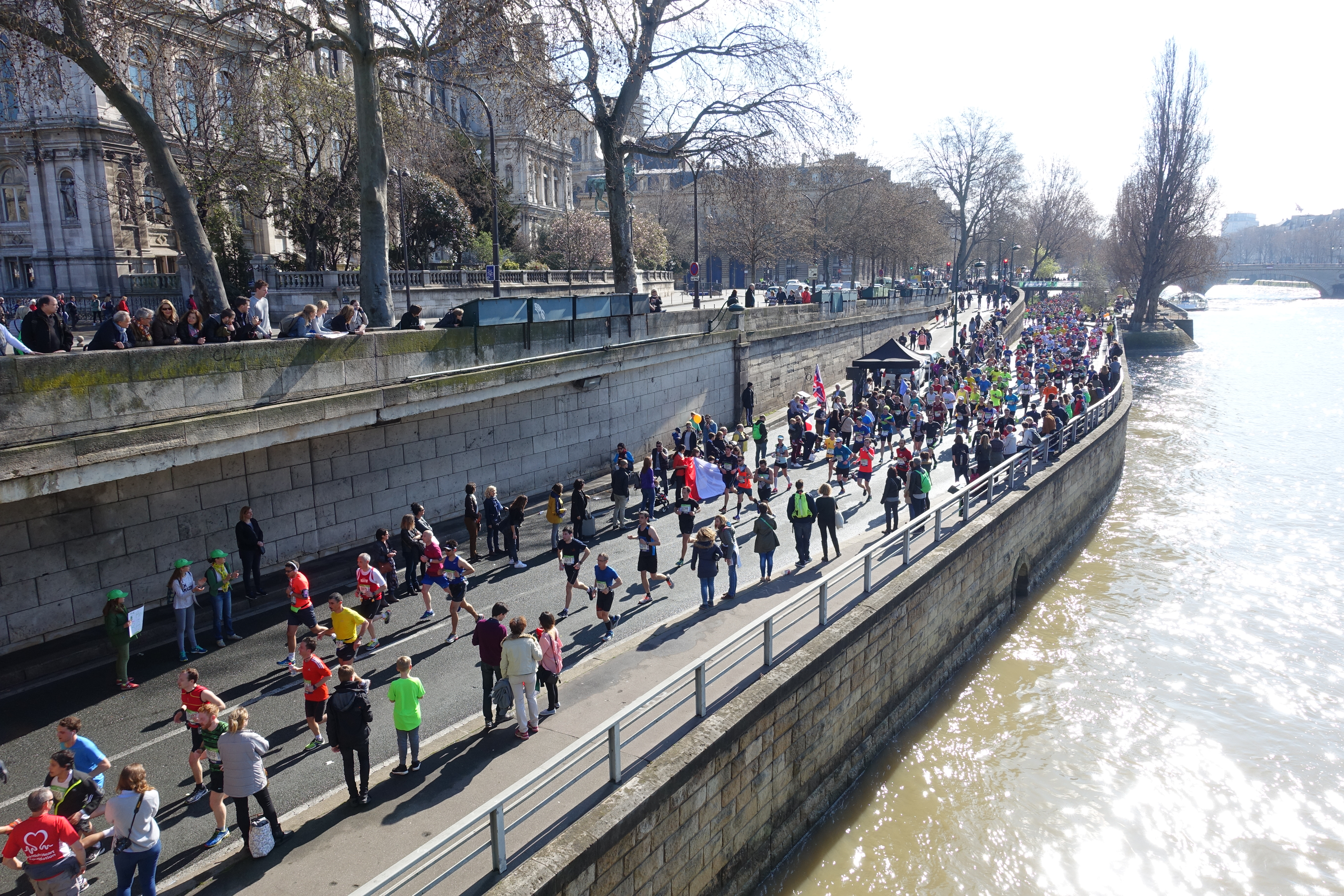 Runners @ Marathon de Paris @ Seine @ Paris